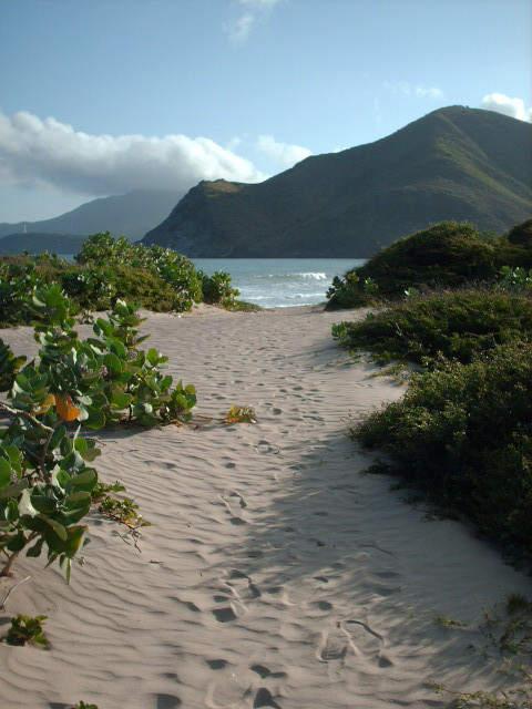 Bahía de Plata, Nueva Esparta.